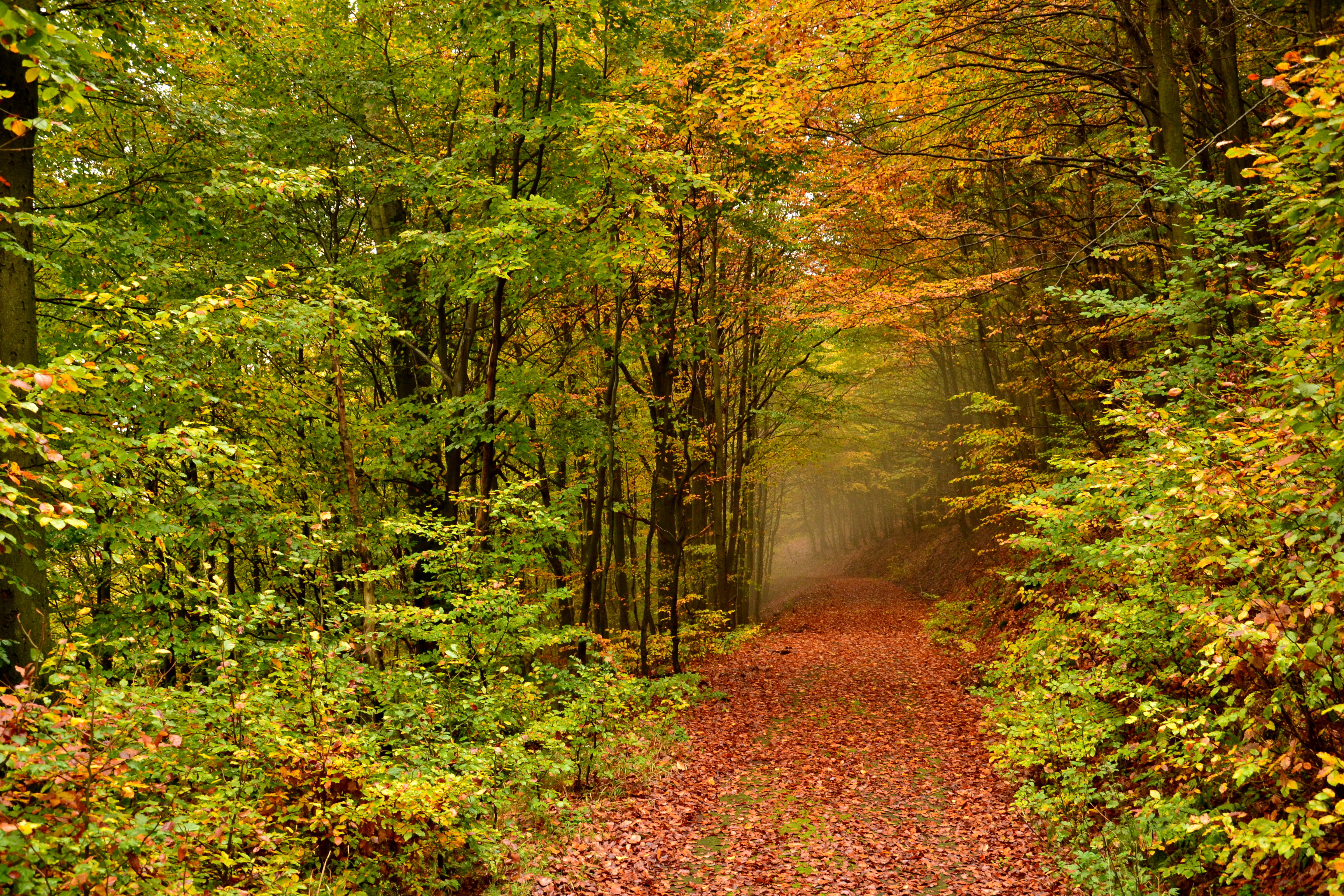 Buky nad Kameničkou - cesta v rezervaci